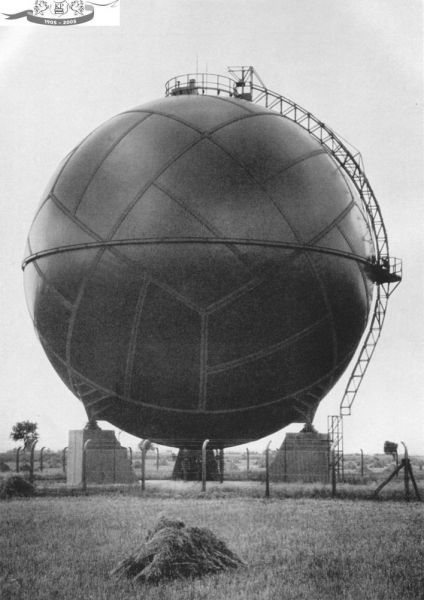 Kugelförmiger Hochdruck-Gasbehälter in Stettin, erbaut 1936 durch das Stahlbau-Unternehmen F. A. Neuman (Eschweiler)